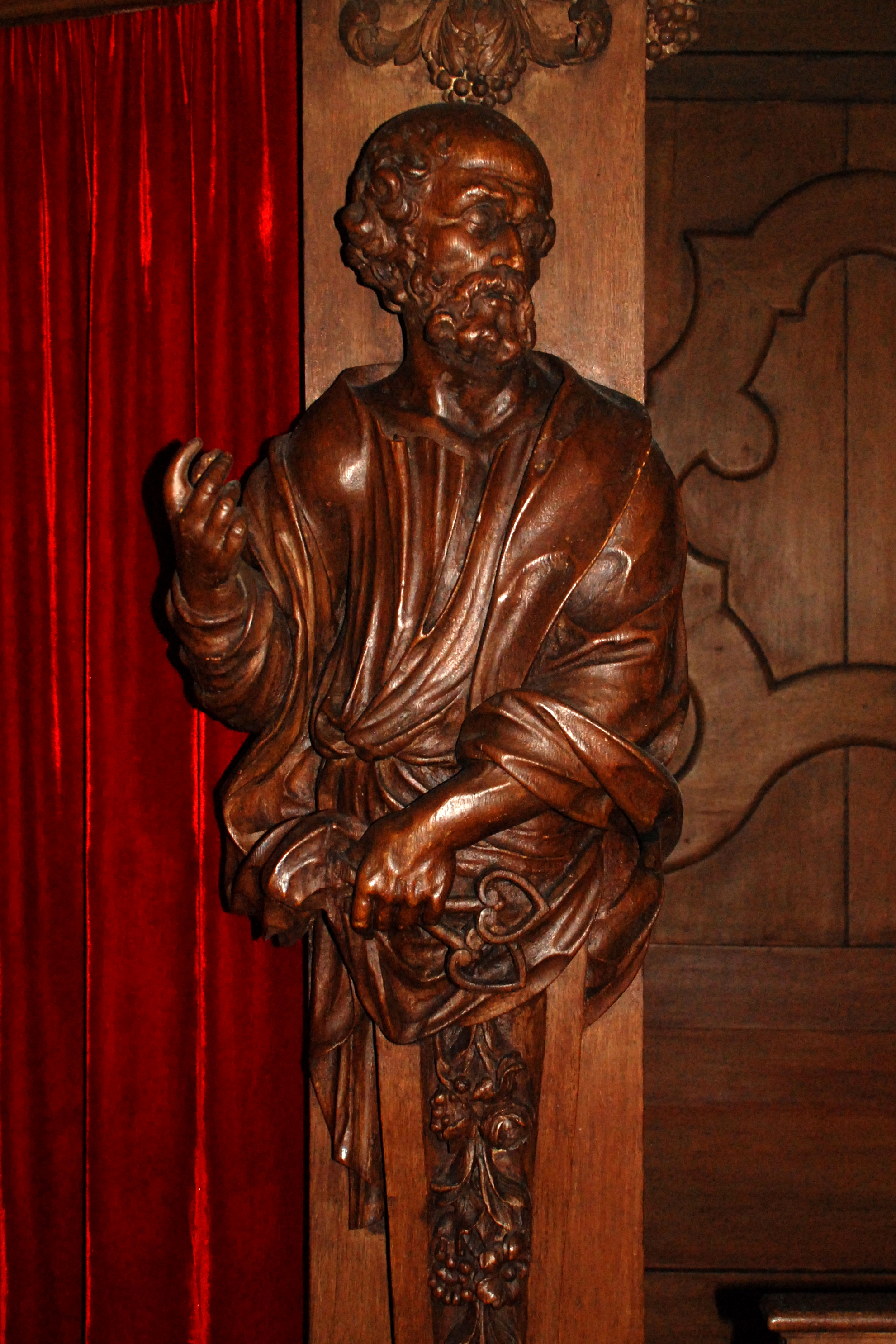 Belgique - Brabant wallon - Ottignies - église Saint-Rémi - confessionnal : saint Pierre